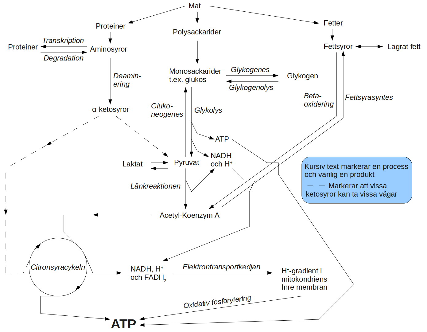 Karta över grundläggande metaboliska processer i människans nedbrytning av födoämnen till energi i form av ATP. Även lite inlagring av energi i olika former.